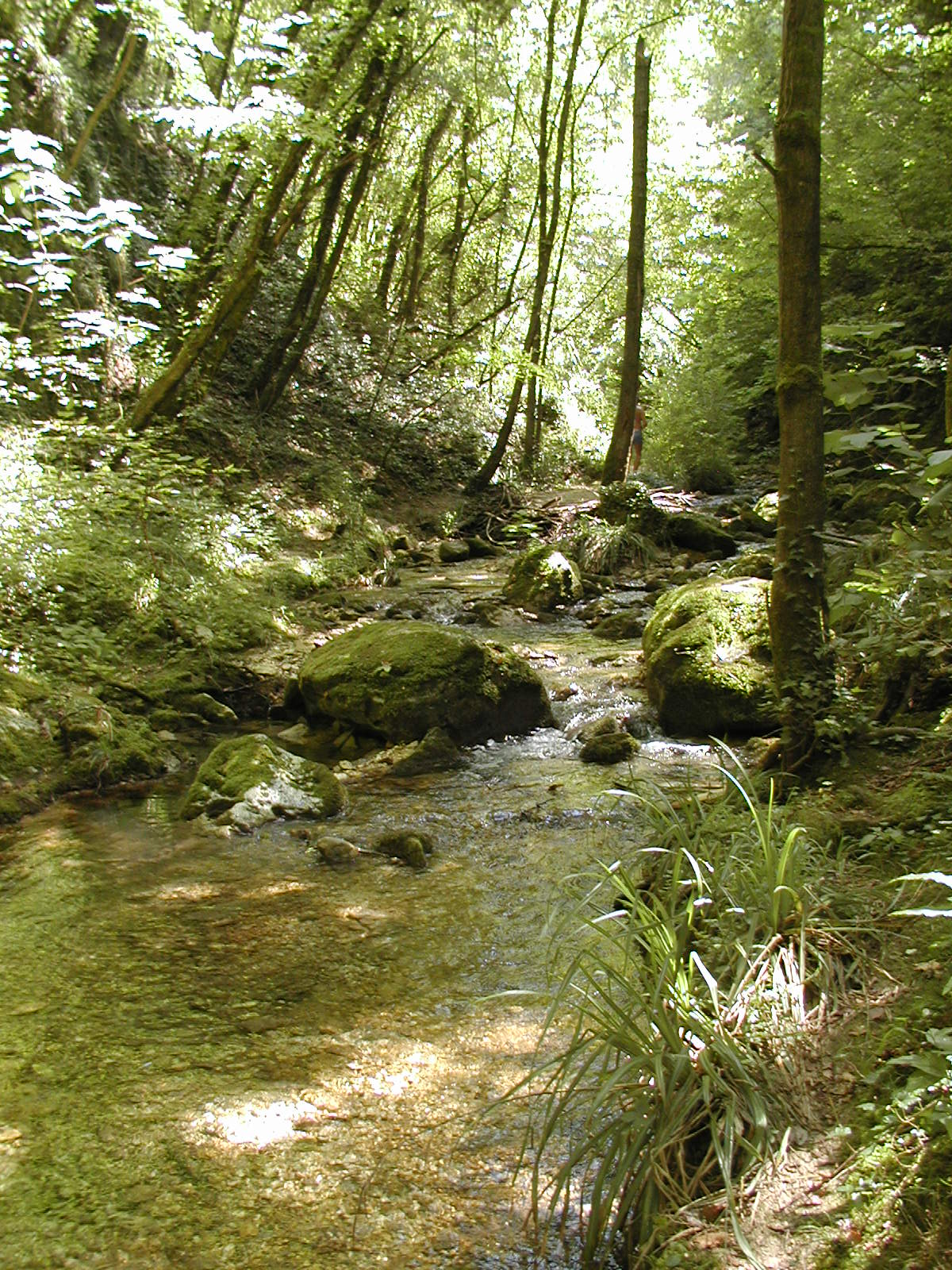 Serramonacesca Natur pur